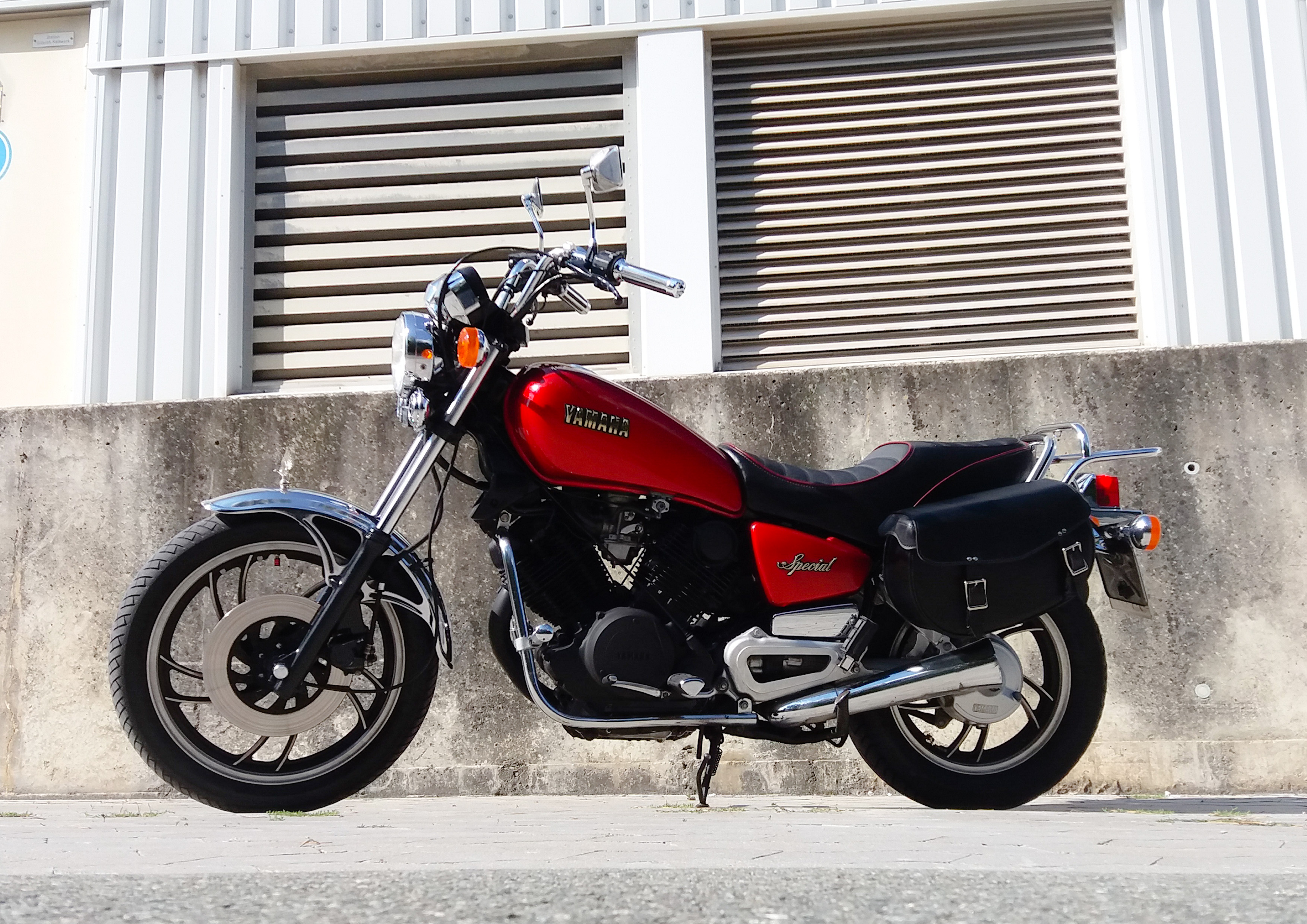 Yamaha XV 750SE